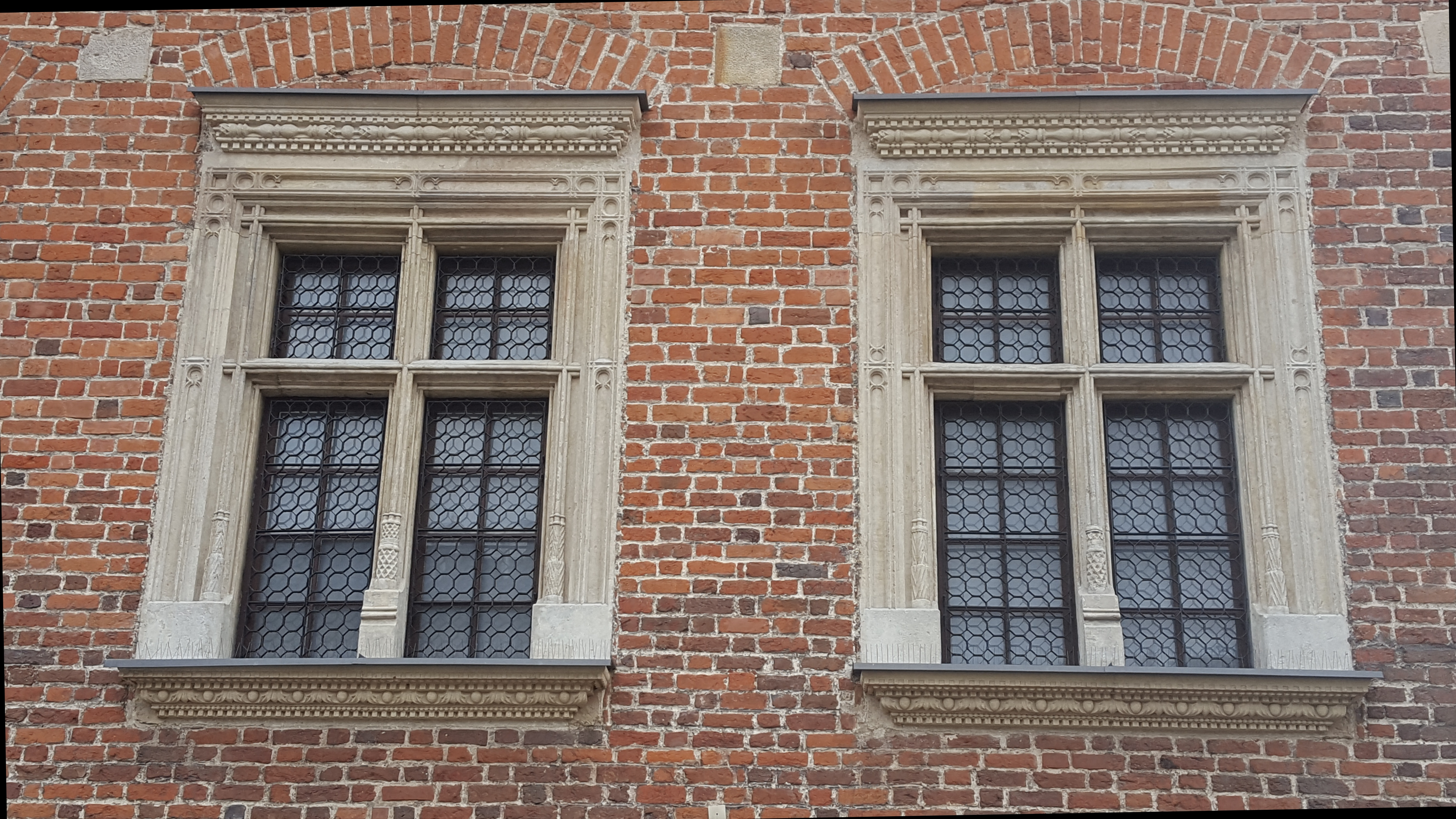 Gotycko-renesansowe okna z lat 1512-1516 w wieży królewskiej Zygmunta I Starego w Piotrkowie Trybunalskim.